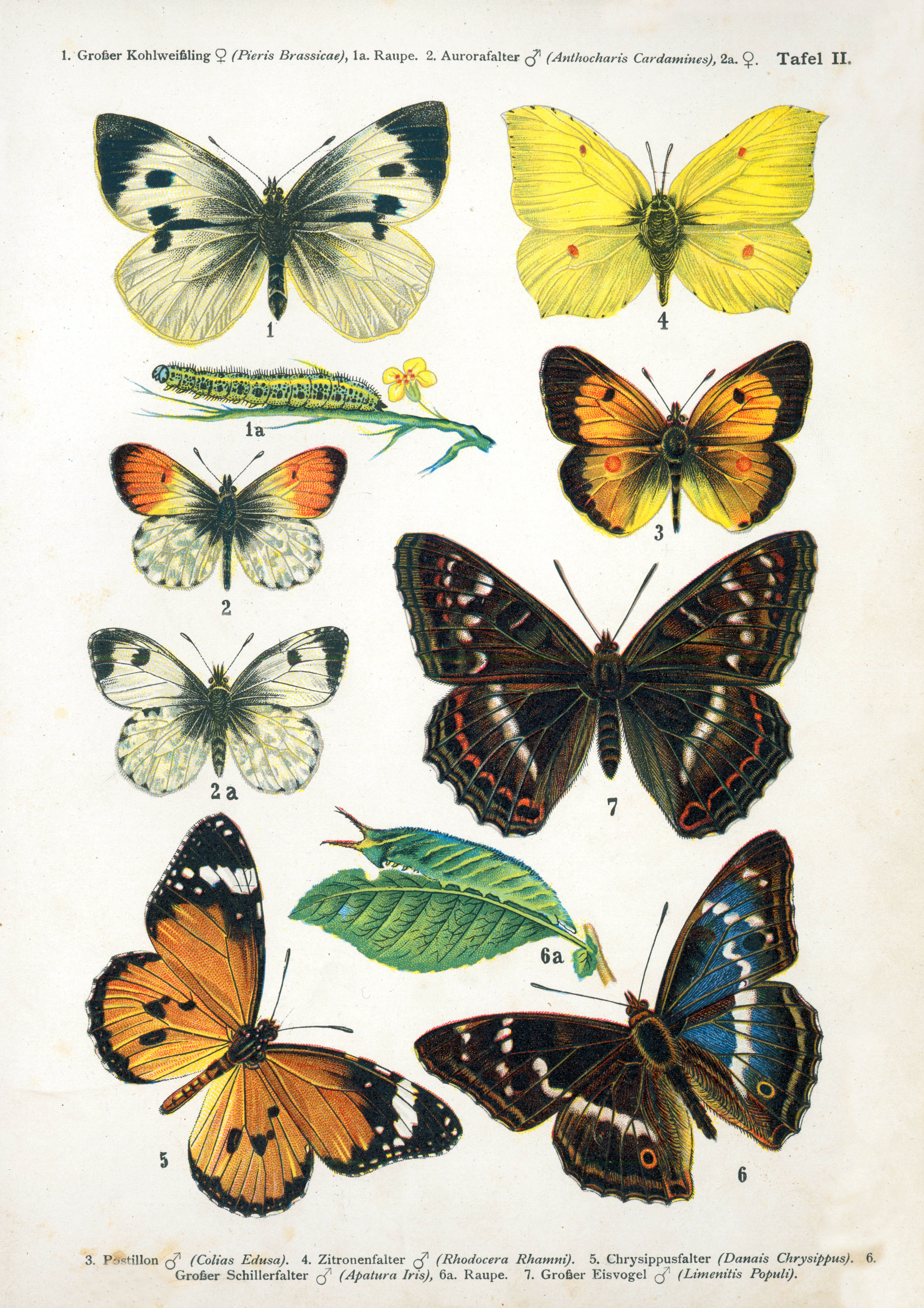 Plate II from Europas bekannteste Schmetterlinge. Beschreibung der wichtigsten Arten und Anleitung zur Kenntnis und zum Sammeln der Schmetterlinge und Raupen (ca. 1895), F. Nemos, Oestergaard Verlag, Berlin, 18 chromolithographische Tafeln, 160 pp.